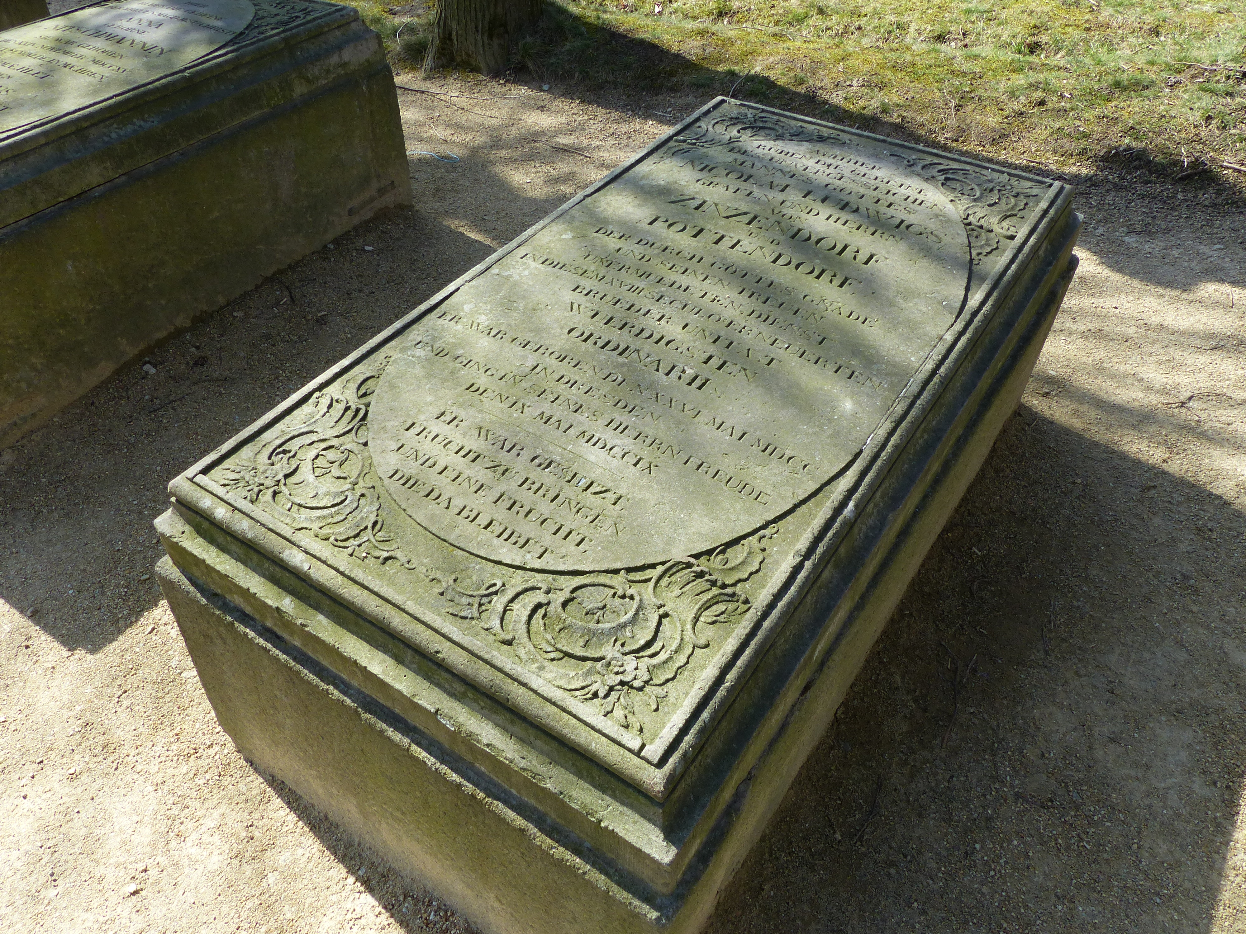 Grab von Nikolaus Ludwig von Zinzendorf auf dem Herrnhuter Gottesacker - Friedhof der Herrnhuter Brüdergemeine, Herrnhut